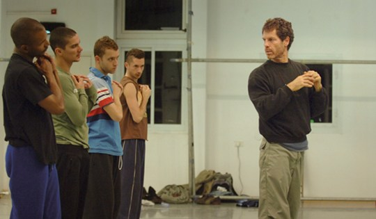 כוריאוגרף אוהד נהרין